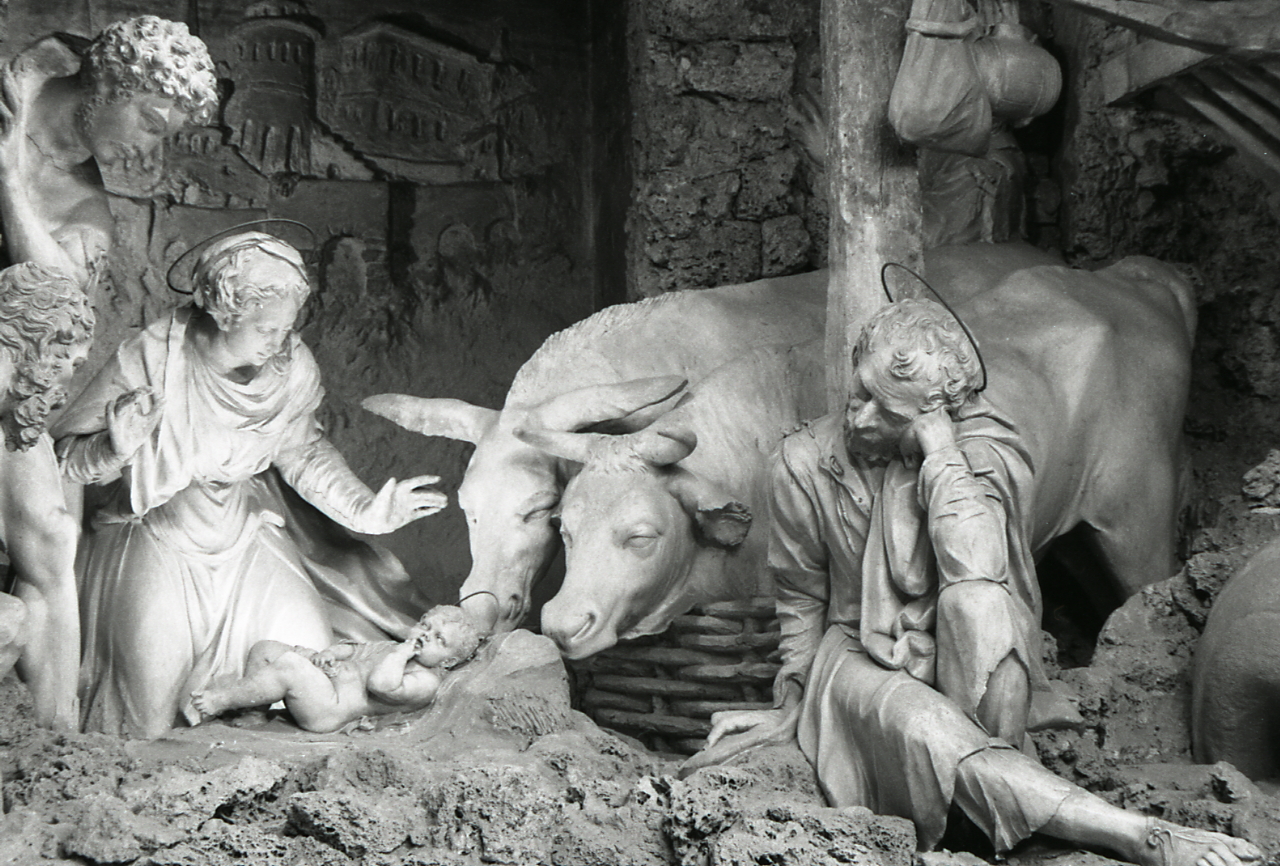 Urbino. Oratorio di San Giuseppe. Interno: Federico Brandani, Presepio, secolo XVI, presepe con sculture in stucco a grandezzanaturale. Barocci. Servizio fotografico : Urbino, 1975 / Paolo Monti. - Strisce: 2, Fotogrammi complessivi: 7 : Negativo b/n, gelatina bromuro d'argento/ pellicola ; 35 mm. - ((Sul portanegativi: N[I]K[MA]T FP4 e iscrizione didascalica: "Urbino (Barocci)/ Palazzo Ducale/ Presepio del". - Fonte: Agenda di Paolo Monti: Leica 1501-3000 Controllo numerazione (1950-1978), presso Archivio Paolo Monti